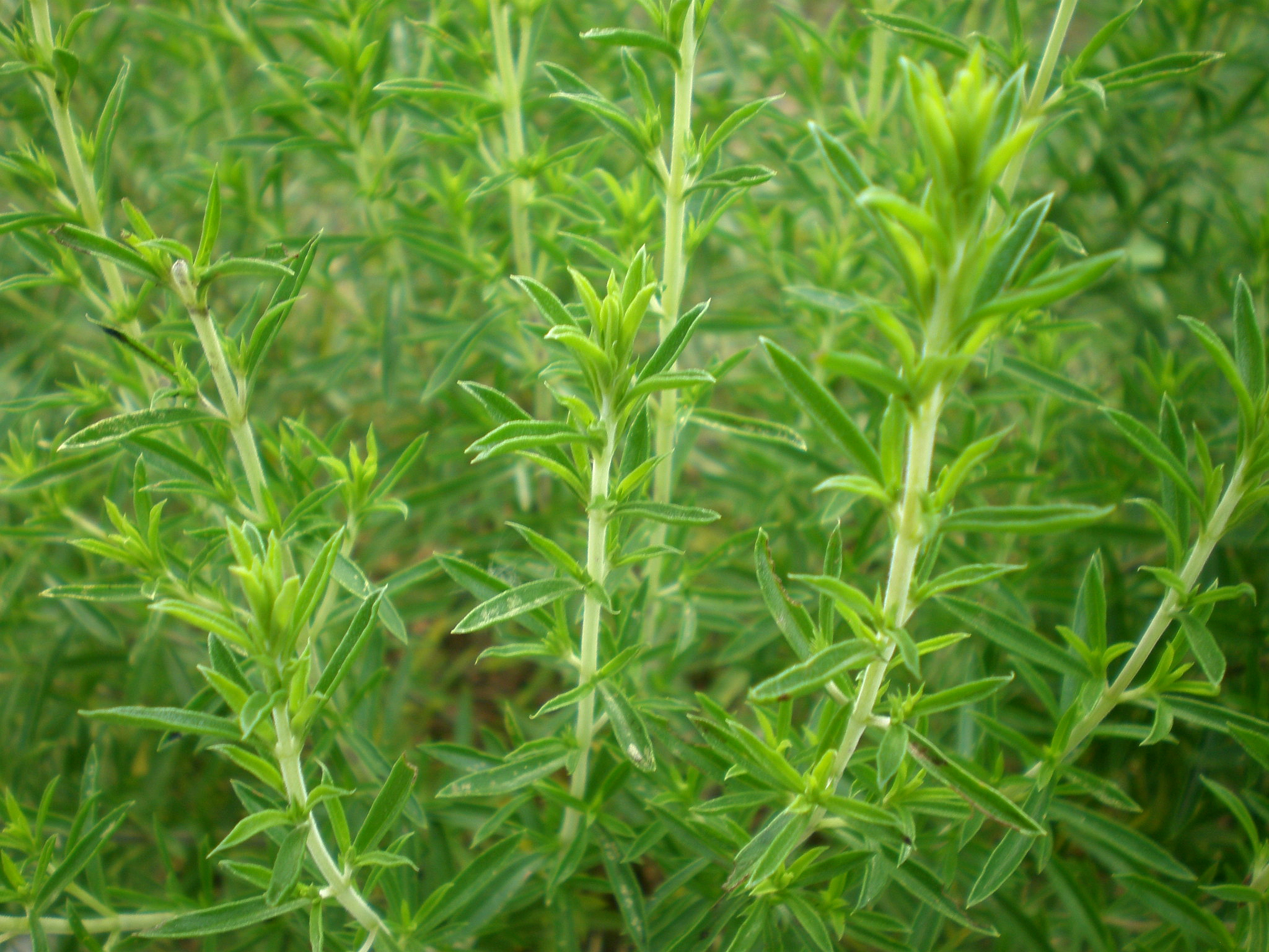 Jardín Botánico de Barcelona.